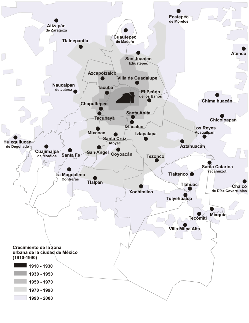 Mapa histórico del crecimiento de la ciudad de México Mapa del crecimiento de la ciudad de México, de 1930 a 2000.